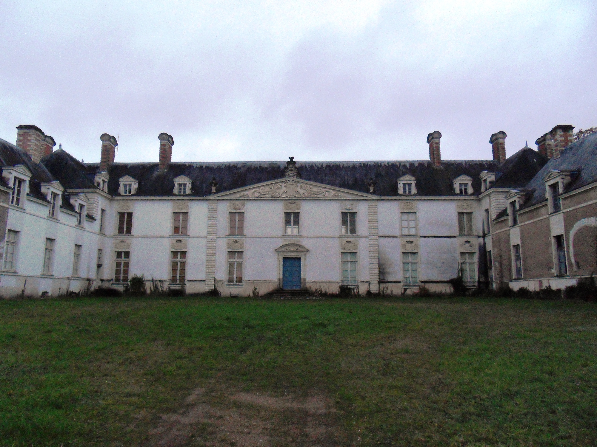 Château de la seylleraie : la cour d'honneur